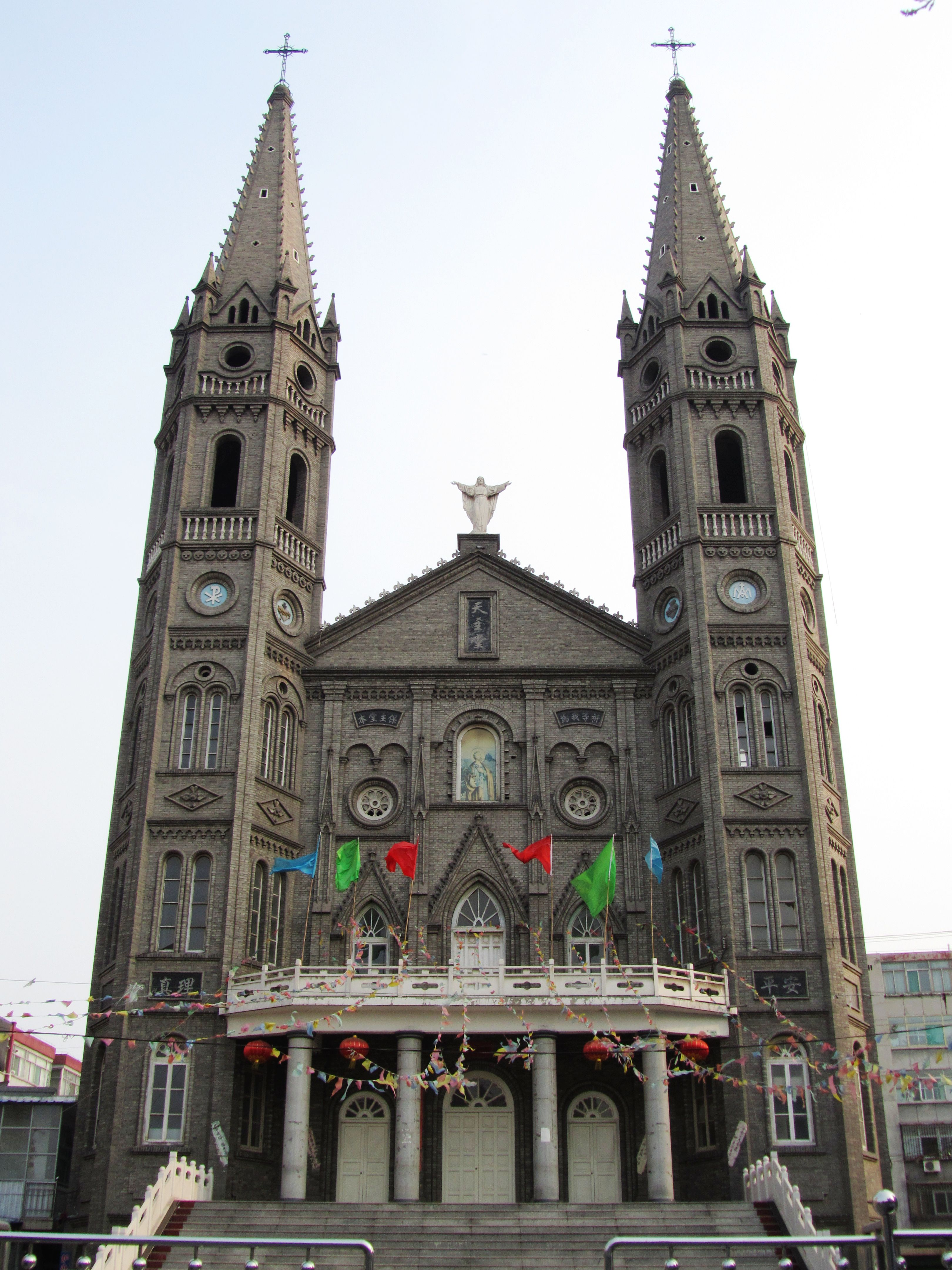 洪洞主教座堂，北立面。